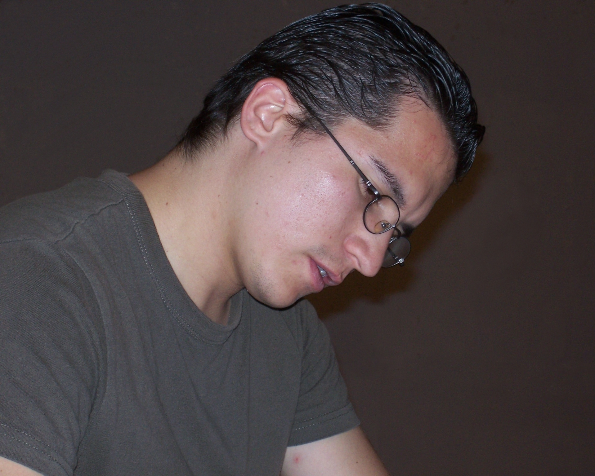 Enzo Fortuny